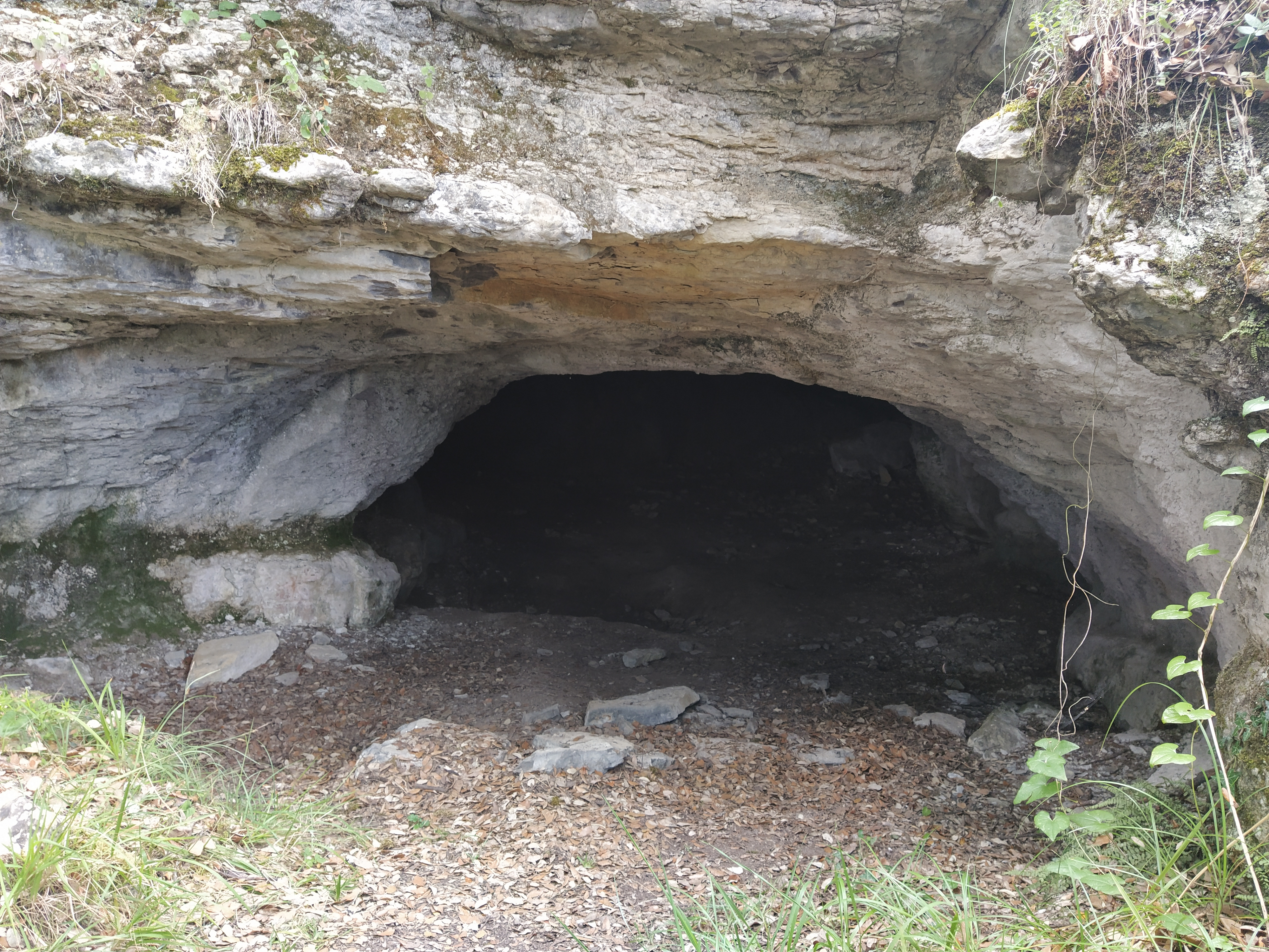 Cueva de los 40 caballeros en la Sierra de Arrato, donde segñun la tradición se refugiaron 40 caballeros de los Mendoza tras la derrota en la Batalla de Arrato (1200).